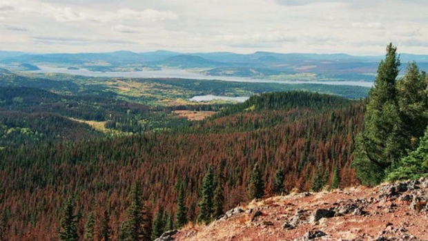 Исушени дрвја како резултат на недостаток на вода